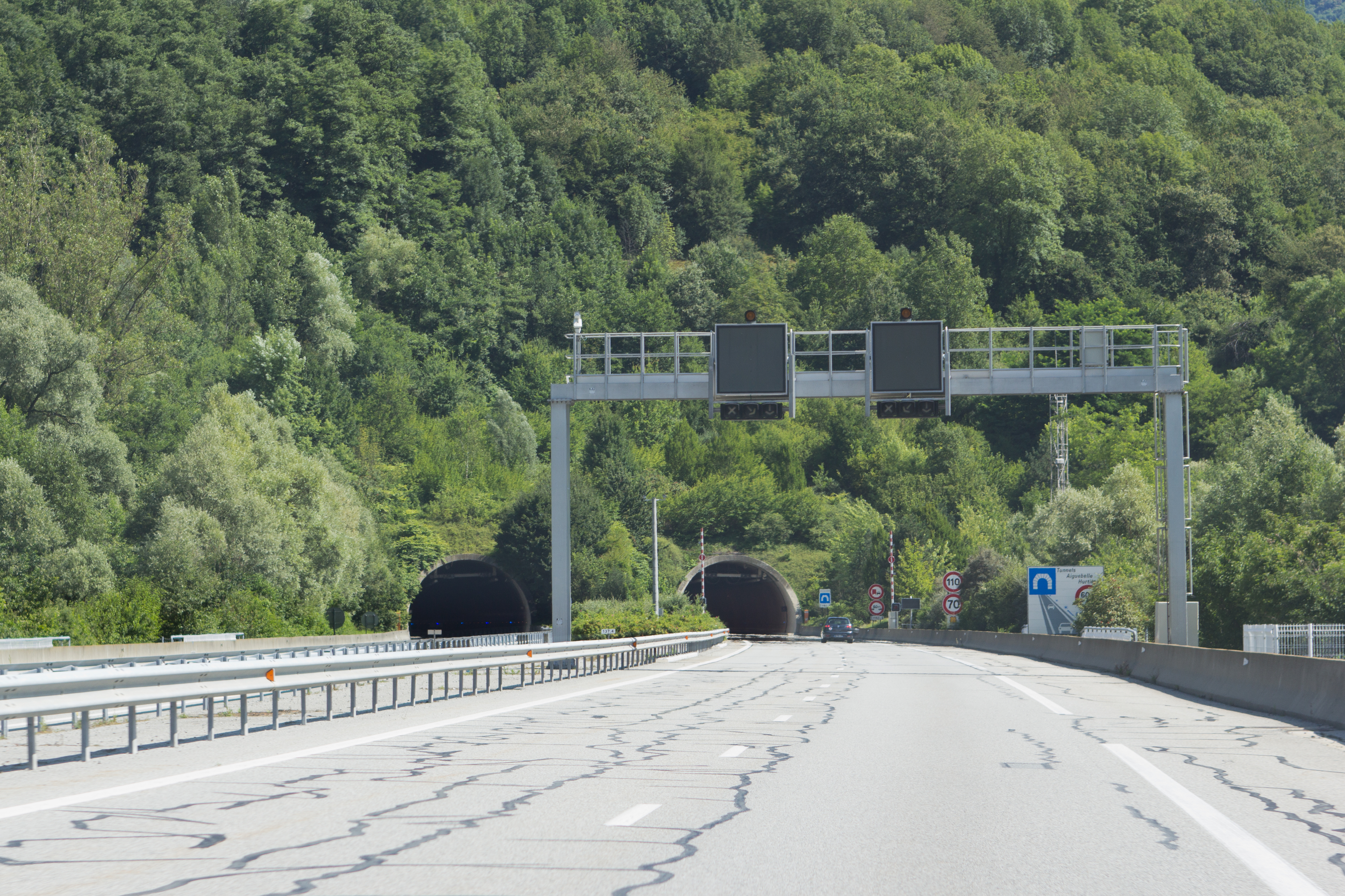 Autoroute A43 (La Maurienne), département de Savoie, France. Tunel des Hurtières - coté sud - vue direction en Montmélian